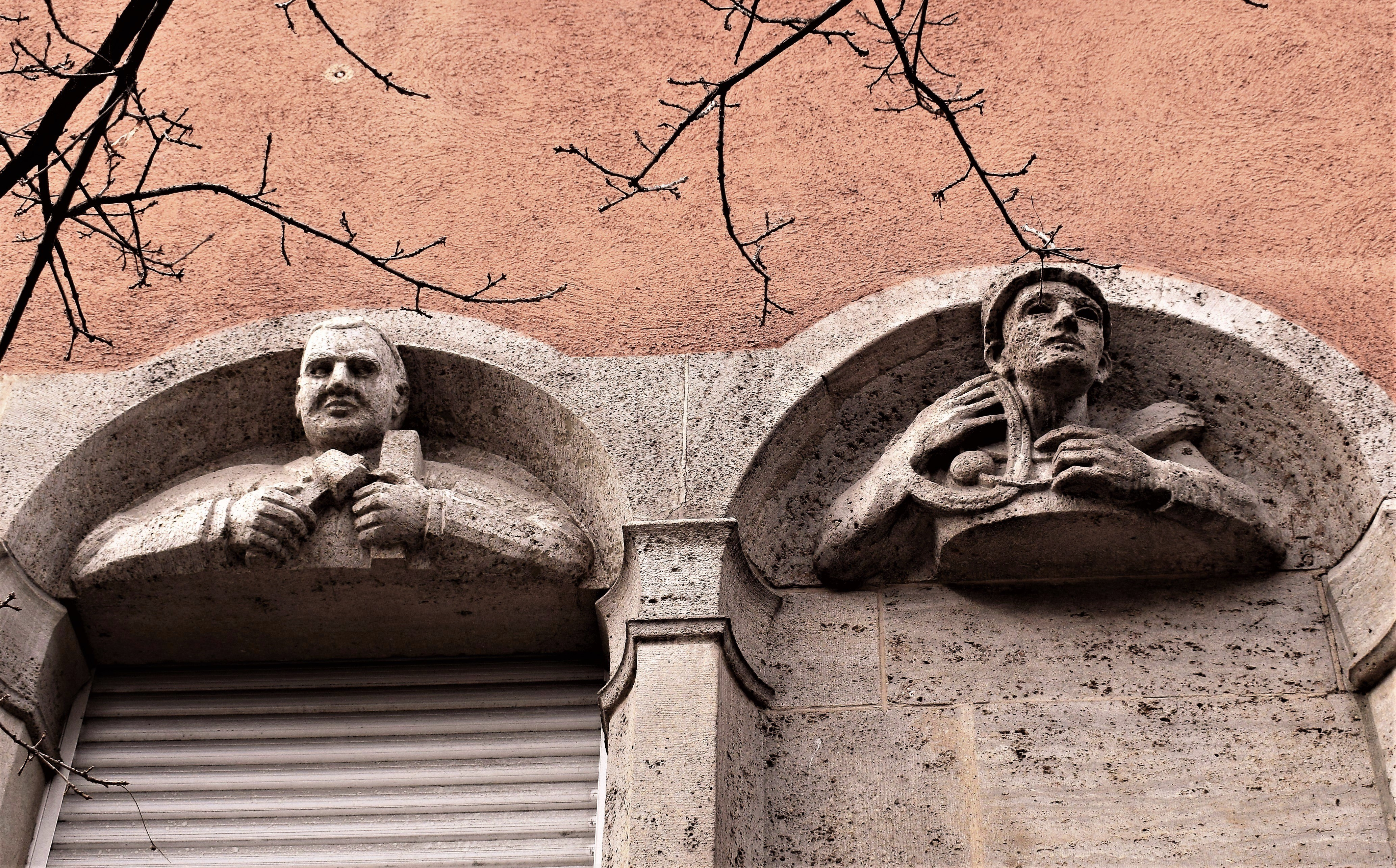 Handwerkskammer für Unterfranken, Rennweger Ring 3, Würzburg, Ostwand: Darstellung verschiedener Handwerksberufe (1926) (von links nach rechts: 4. Gruppe)